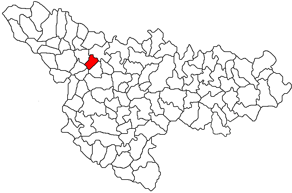 Biled, Timis